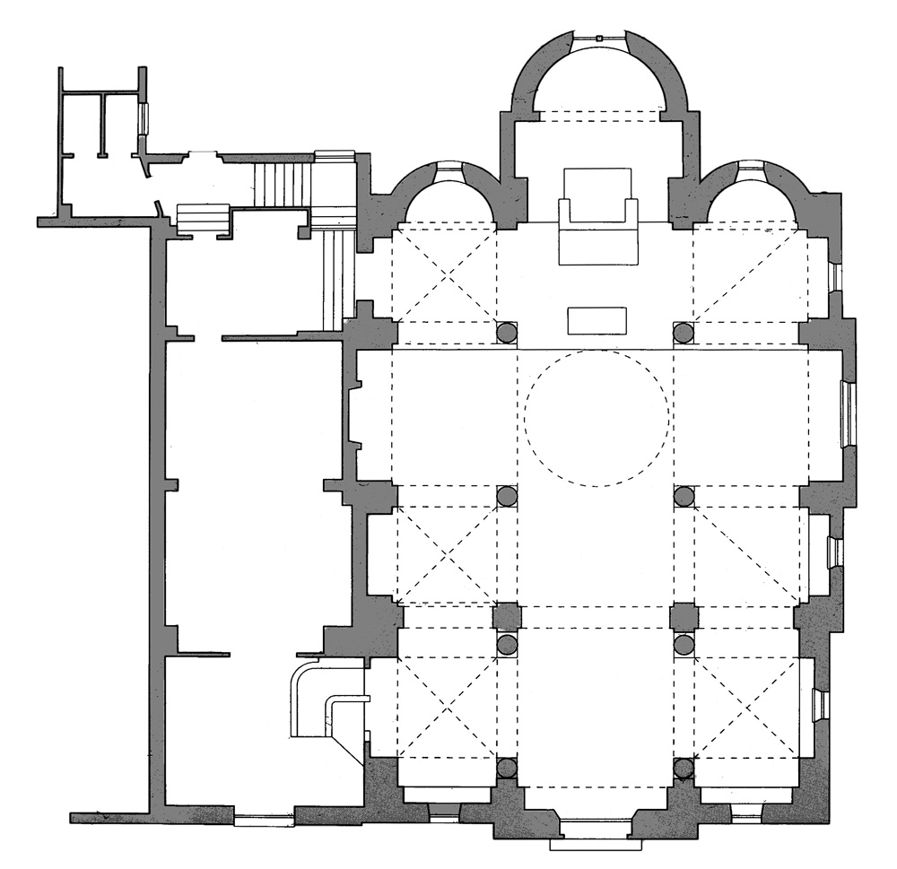 Reggio Calabria:Pianta della Chiesa degli Ottimati